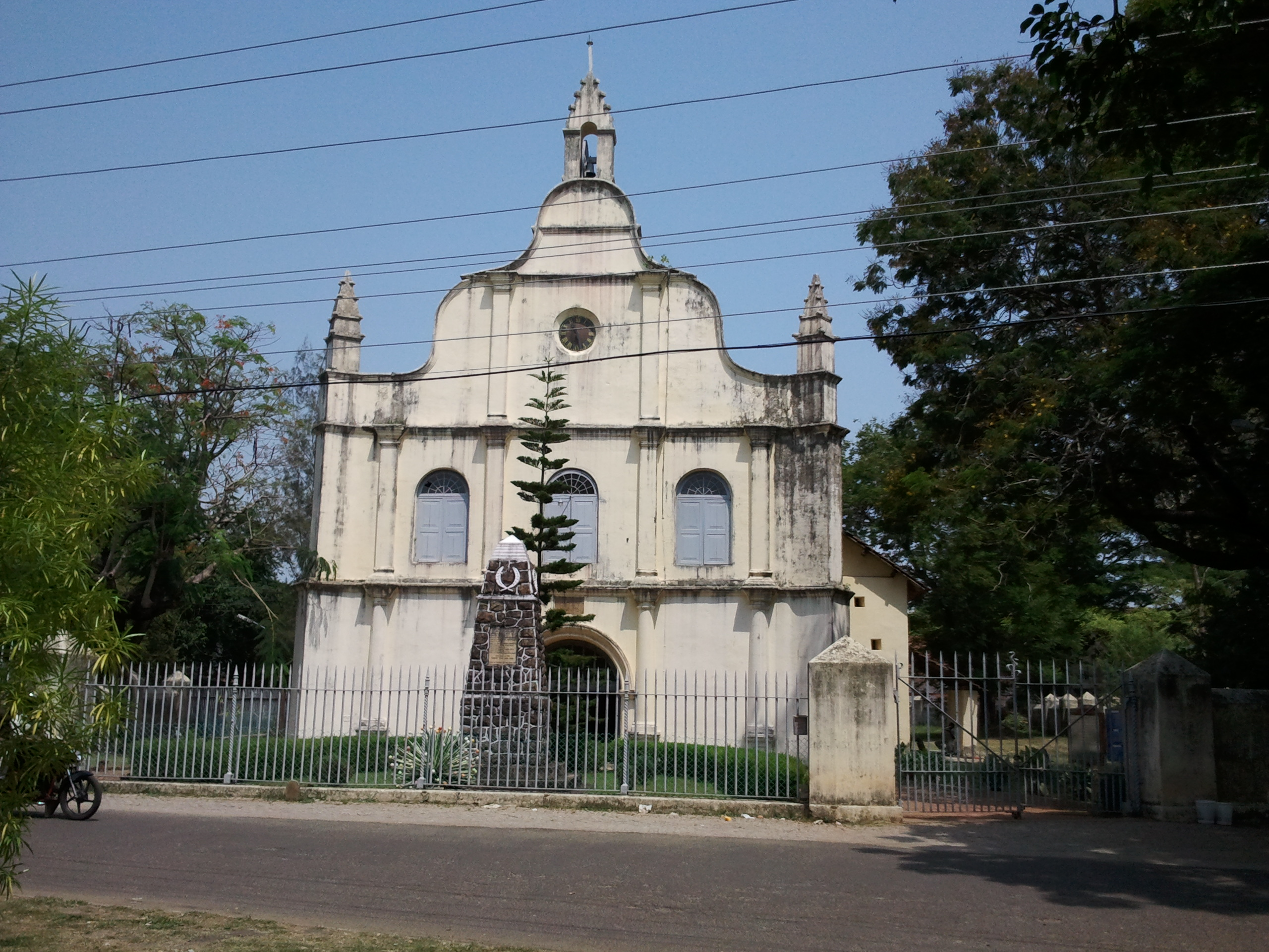 St. Francis Church Fort Kochi, Ernakulam (Dutch's) Renovated Year - 1779